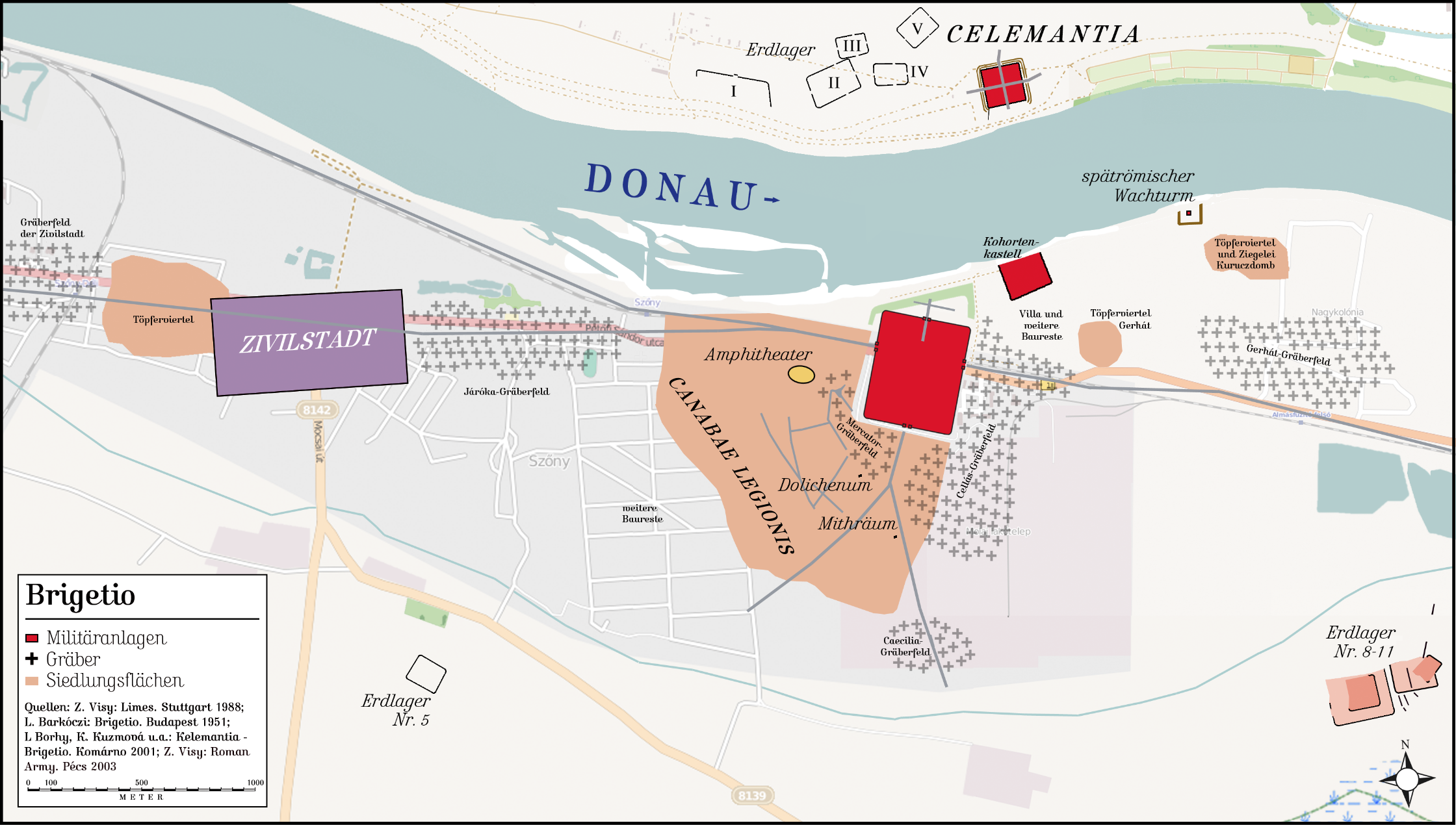 Das Legionslager Brigetio war ein römisches Militärlager, das als Grenzgarnison für die Überwachung eines Donauabschnitts des pannonischen Limes zuständig war. Brigetio lag auf dem Gebiet der nordungarischen Stadt Komárom (Komorn) im Komitat Komárom-Esztergom. Die verschiedenen Quellen zu dieser alles vereinenden Zeichnung sind im Bild selbst enthalten!